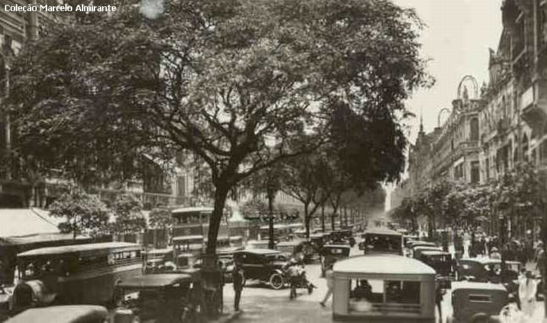 Avenida Rio Branco por volta de 1930